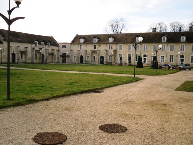 La Ferme Neuve de Grigny (91)